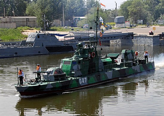 Проект 1204 «Шмель» — дивизион артиллерийских катеров охраны водного района Каспийской флотилии